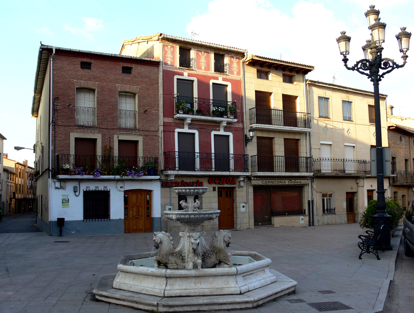 Castañares de Rioja (La Rioja - España)